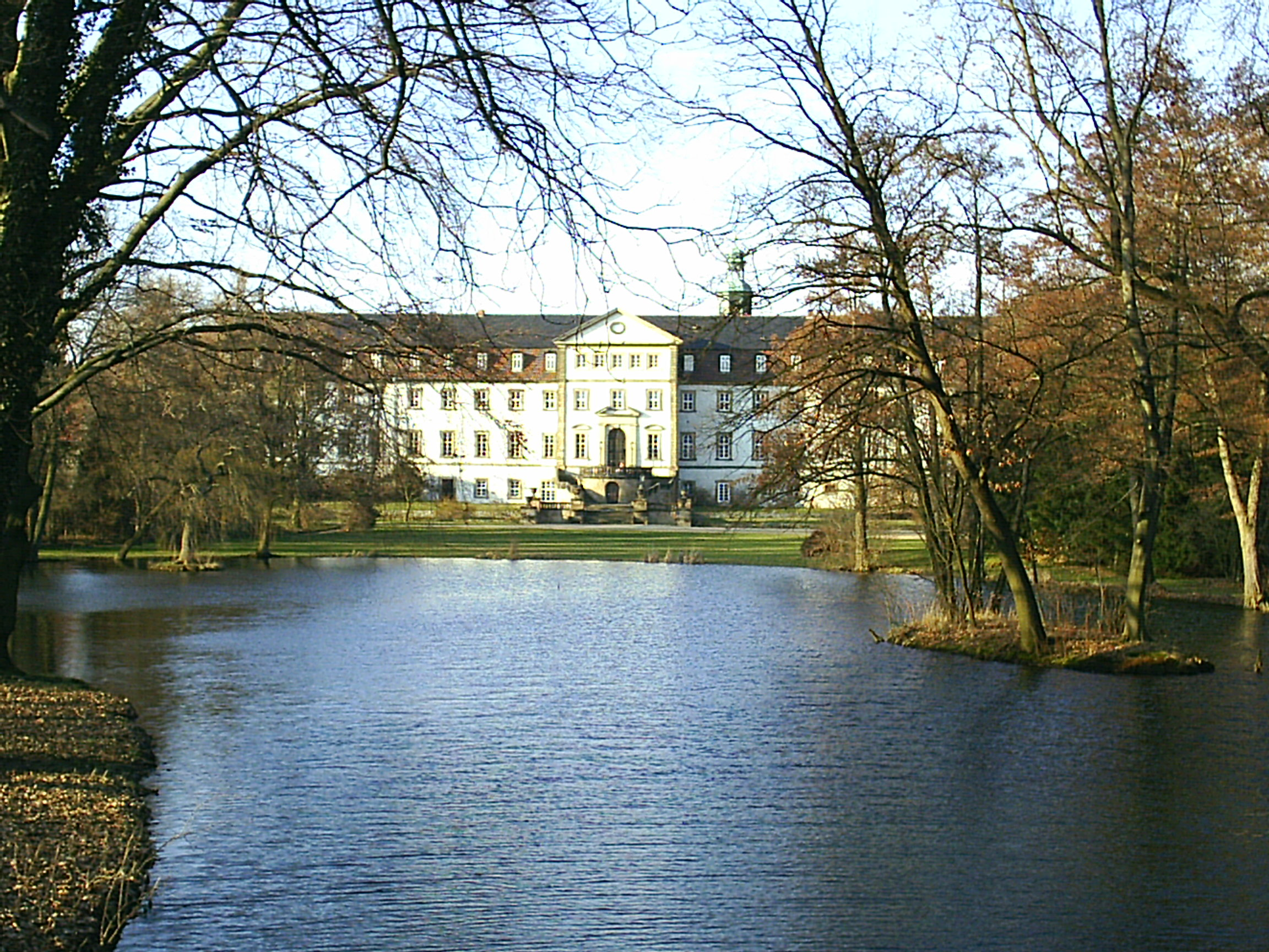 Schloss Ringelheim, Salzgitter, Germany